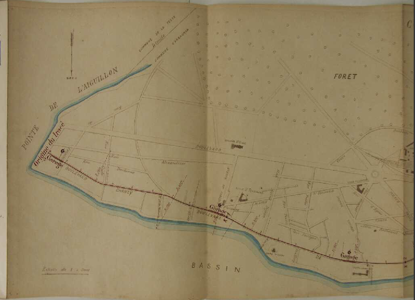 Avant-projet du tracé de la ligne du tramway d'Arcachon